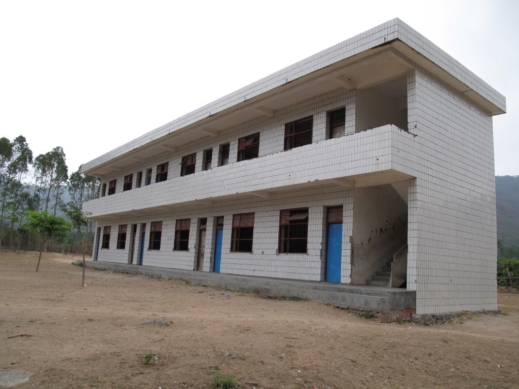 海南 東方市 俄賢逸夫小學